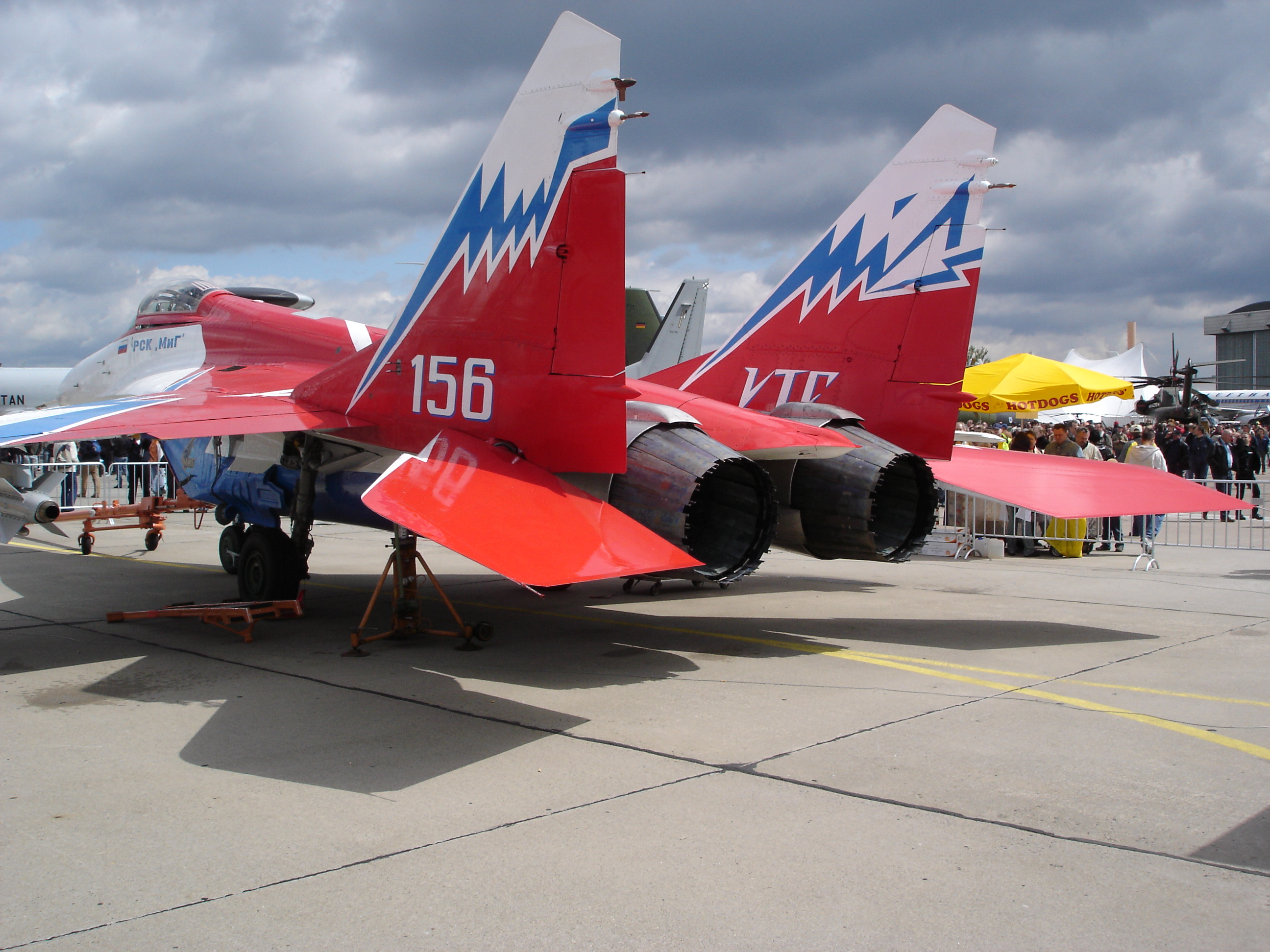 MiG29-OVT Rückansicht, fotografiert auf der ILA 2006 in Berlin/Schönefeld